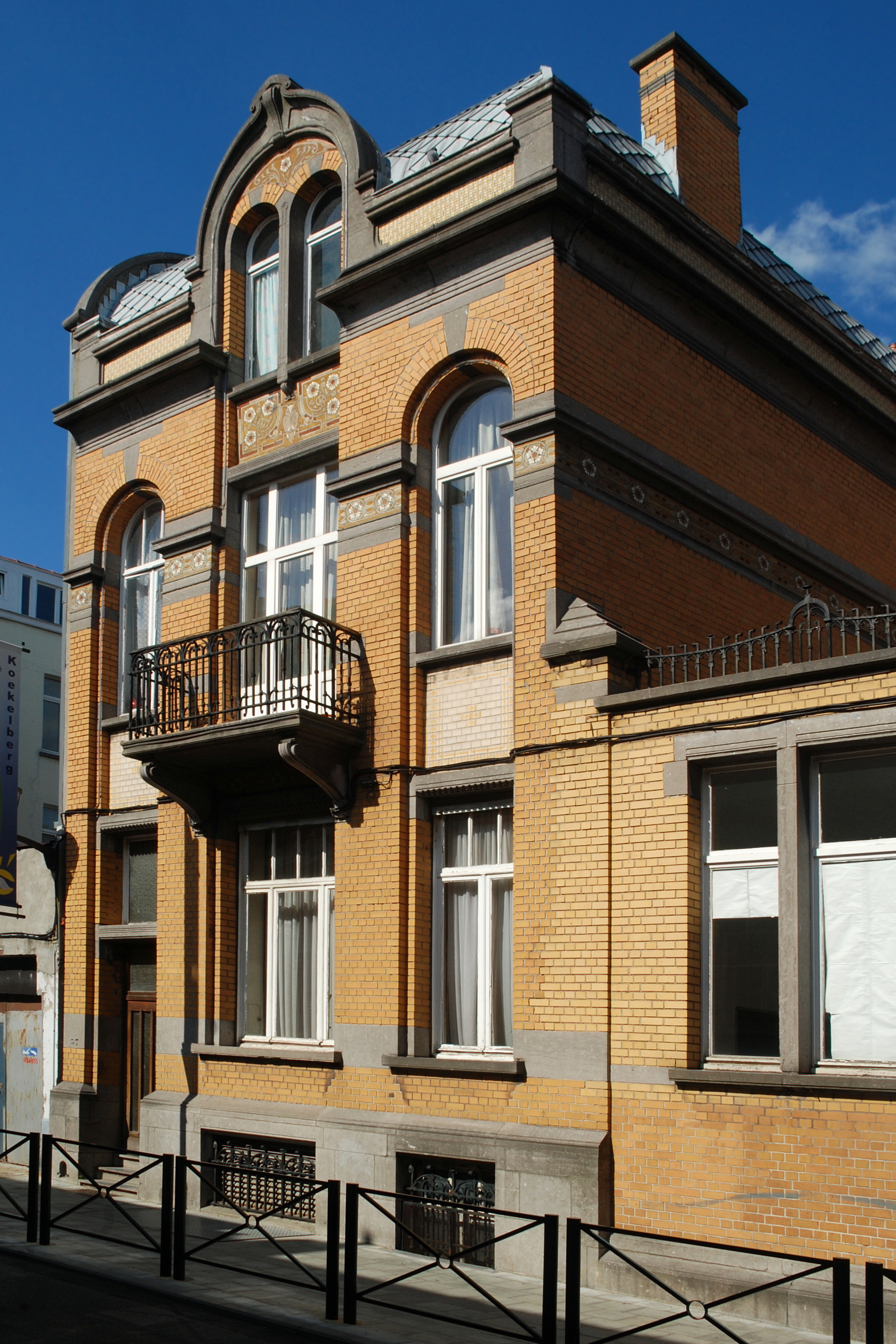 Belgique - Bruxelles - Ancienne école communale des filles de Koekelberg (Art nouveau - architecte Henri Jacobs)